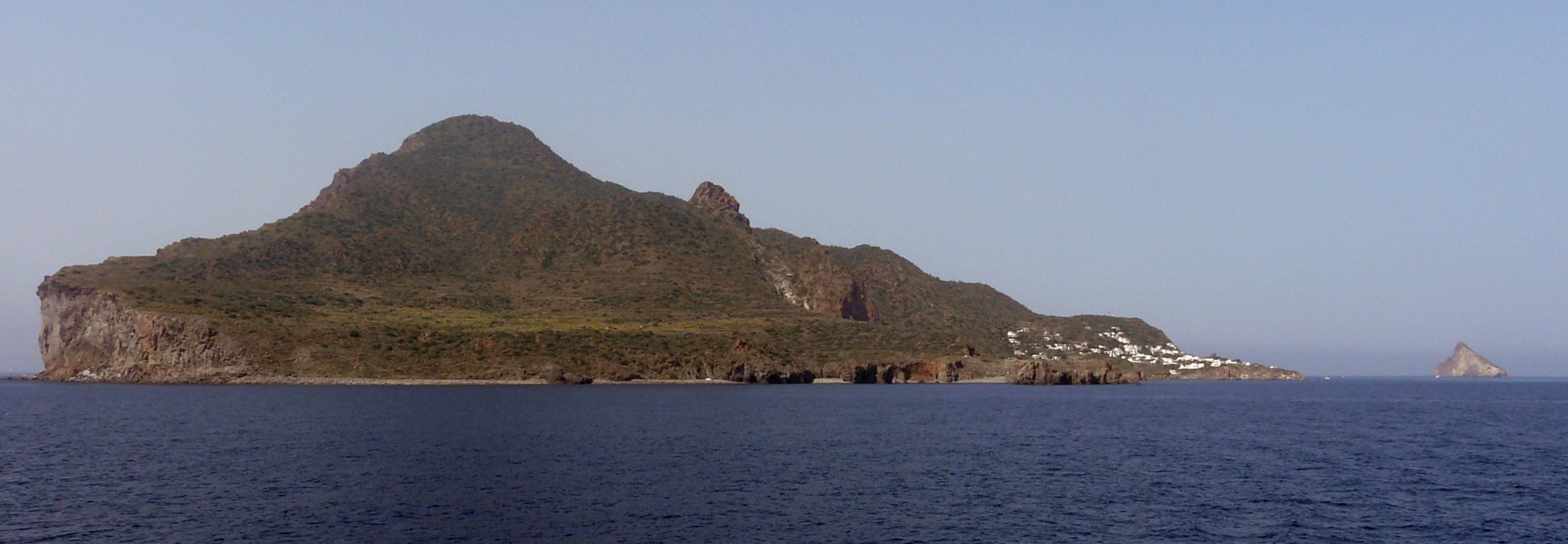 Panarea (îles éoliennes, Sicile)